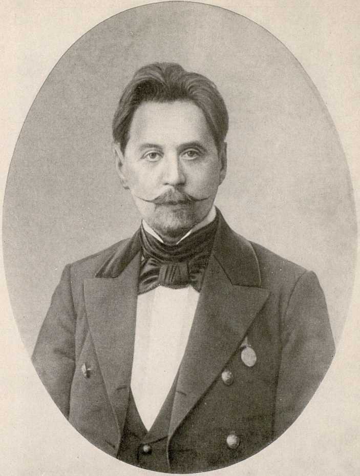 Анненский Иннокентий Фёдорович. 1900-е годы. (ЦГАЛИ).